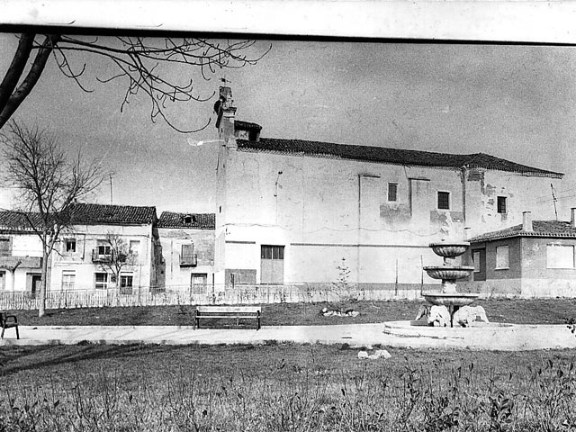 Fuente con base de elefantes e Iglesia al fondo - Cistérniga (La) (Valladolid) - Fuente con base de elefantes e iglesia al fondo. - Fotografía. Papel 118 x 88 B/N